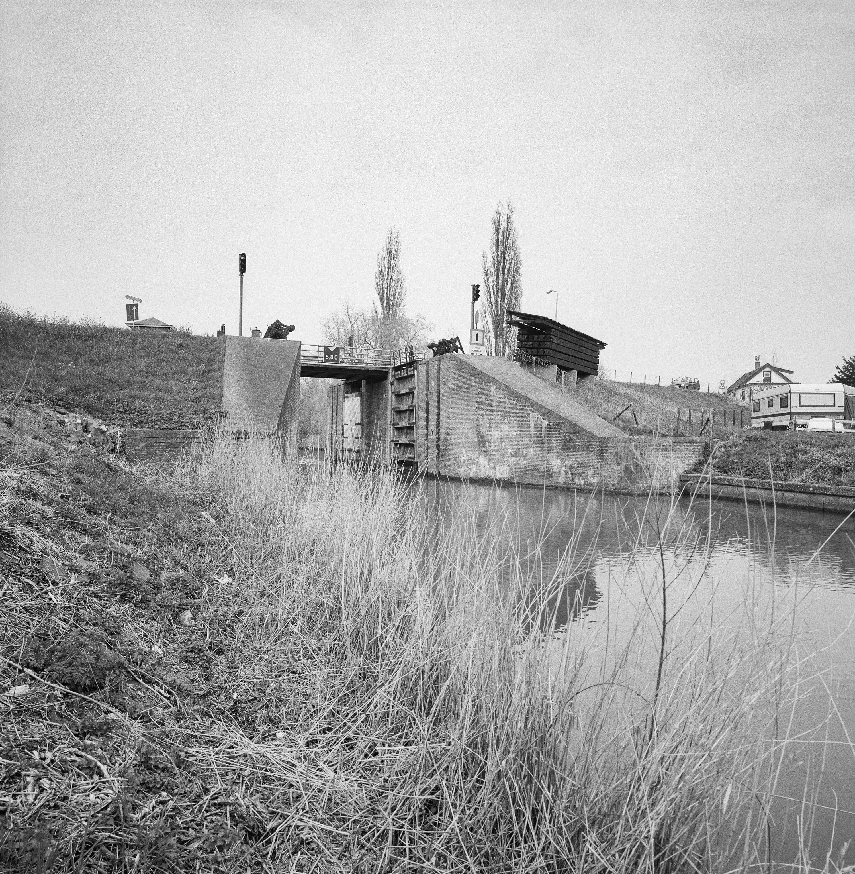 Inundatiesluis/ Sluis: Overzicht inundatiesluis (opmerking: Gefotografeerd voor MIP Gelderland, bladzijde 19)